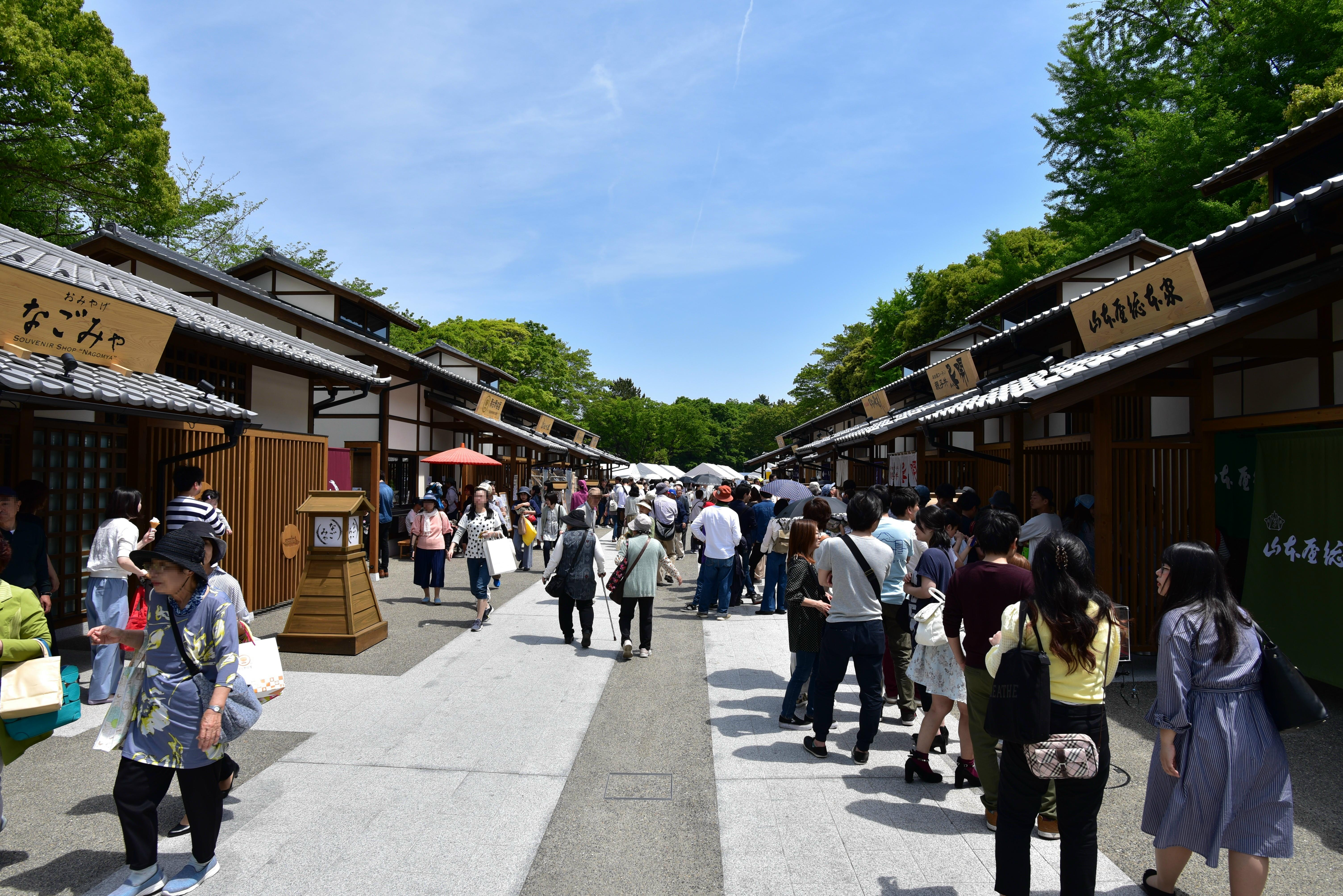 金シャチ横丁（義直ゾーン）